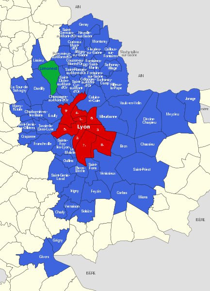 Communes du Grand Lyon, en vert Limonest